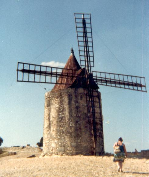 Daudet's windmill in Provenza.